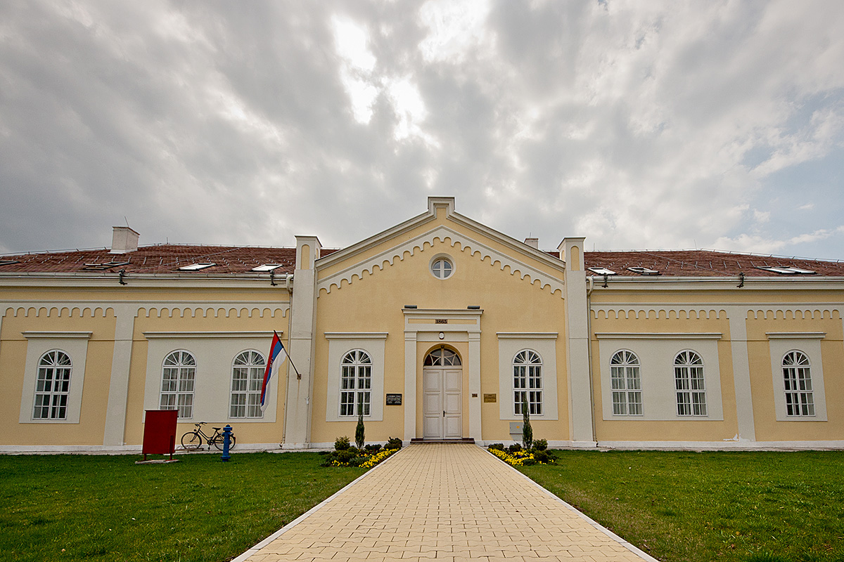 Europeana Intensively scattered clouds provided a nice, diffused lighting for this building. I waited until the time was right to capture this shot.